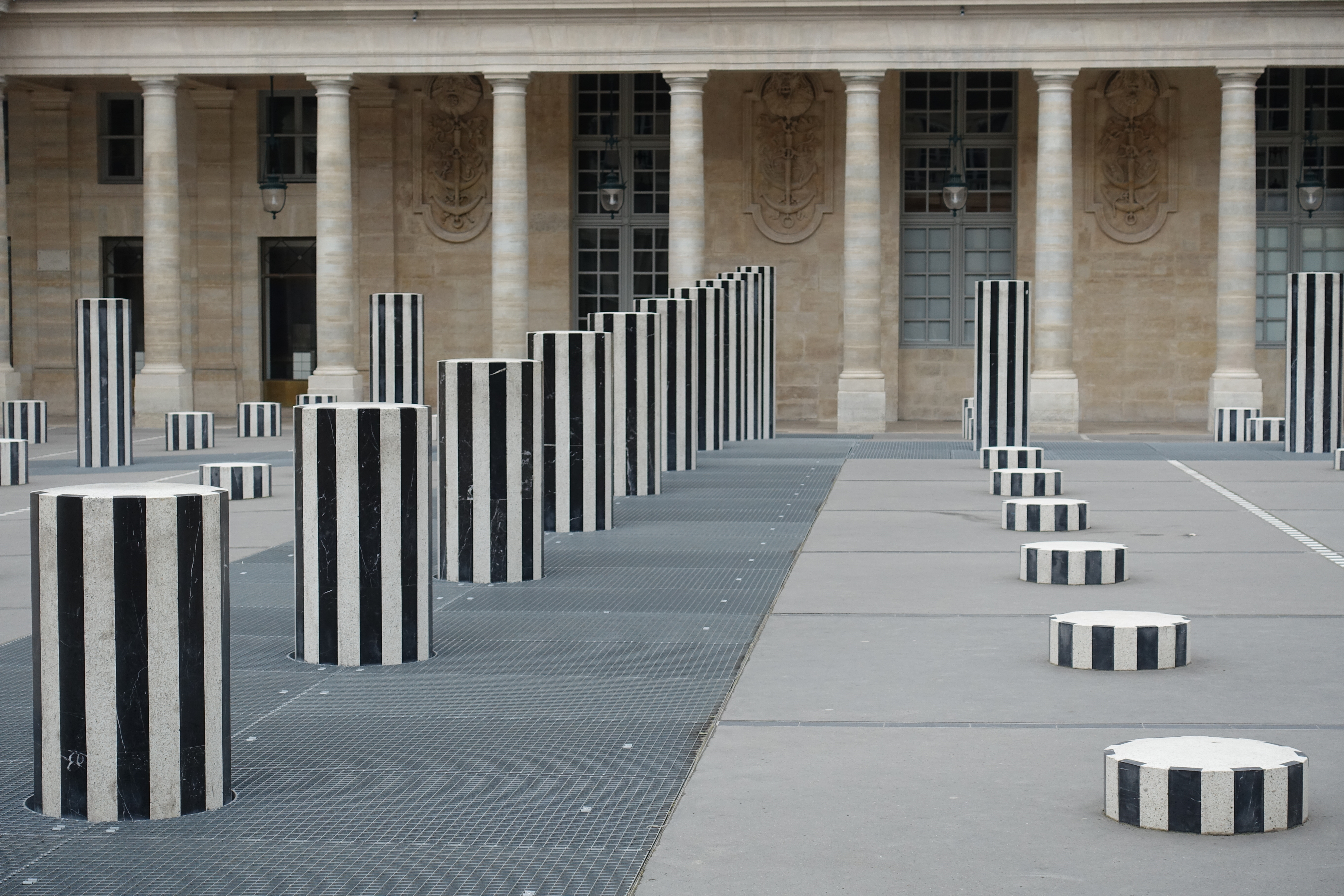 Colonnes de Buren @ Palais Royal @ Paris